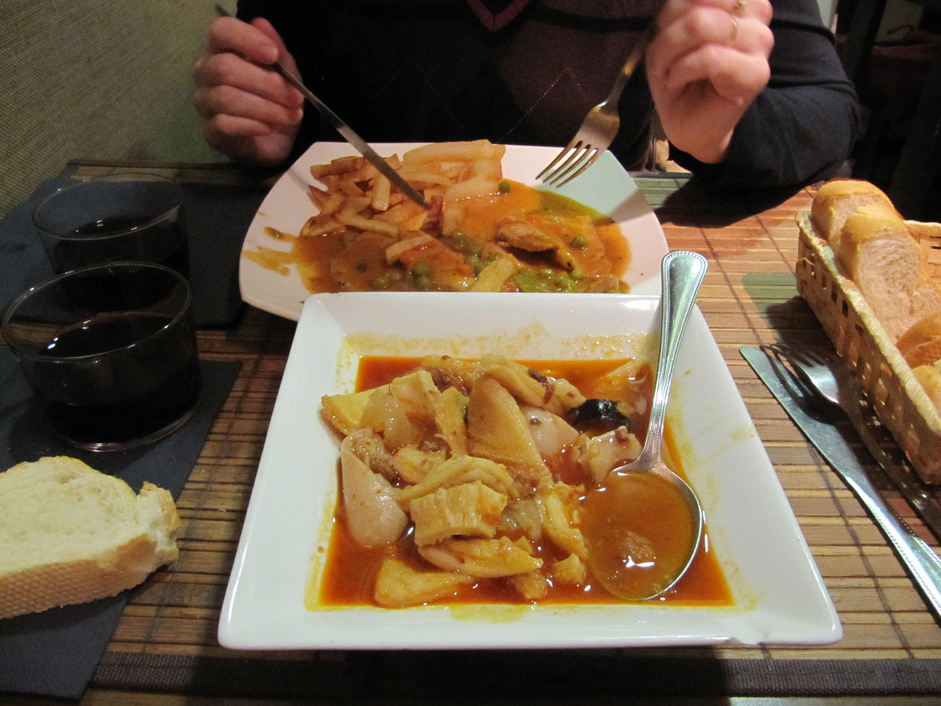 Callos a la Madrileña.